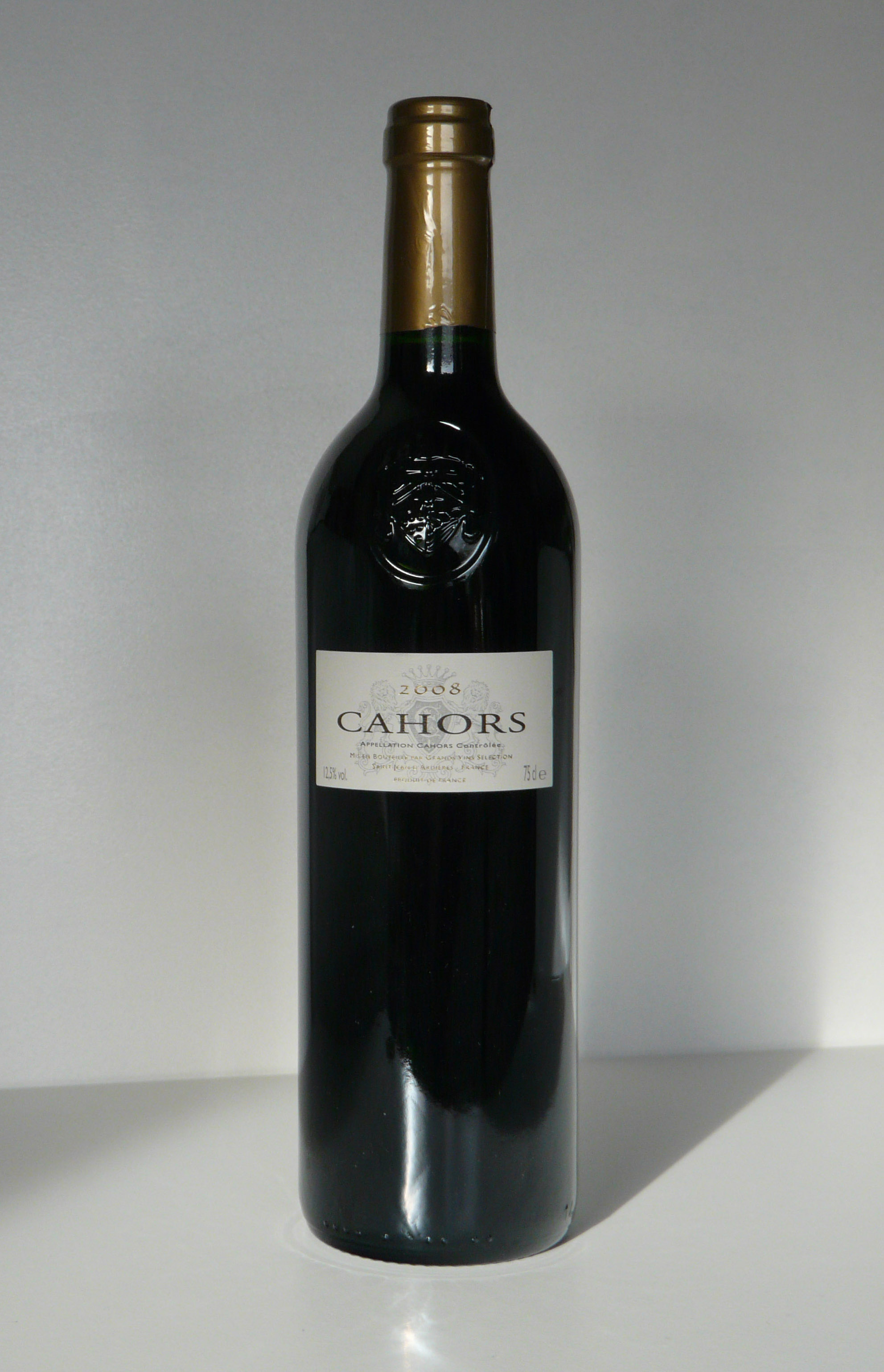 Cahors: rot, trocken. Prodiut de France, AOC-Markenschutz.